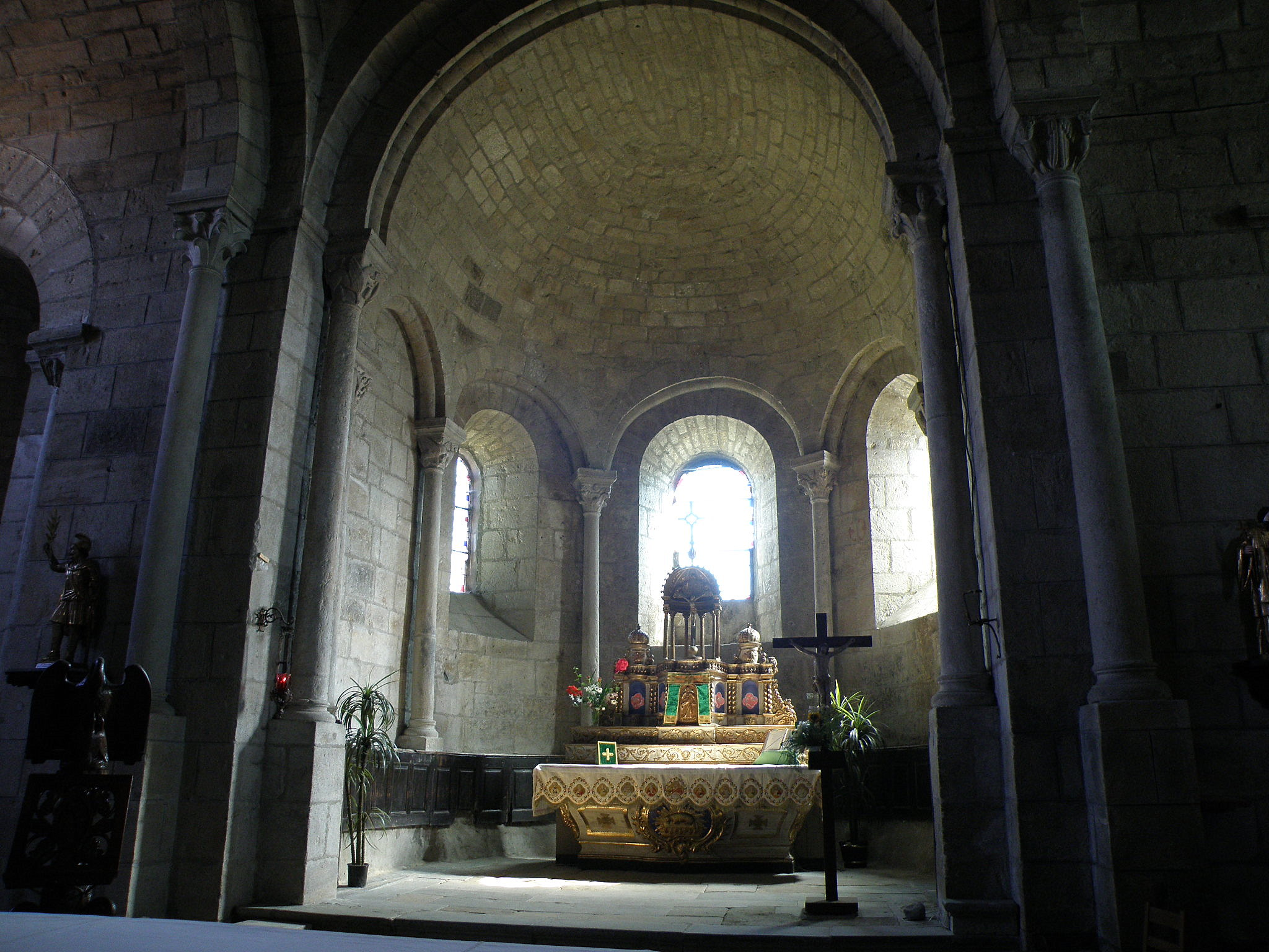 Saint-Julien-Chapteuil, comm. du dép. de la Haute-Loire, France (région Auvergne). Église Saint-Julien, abside.